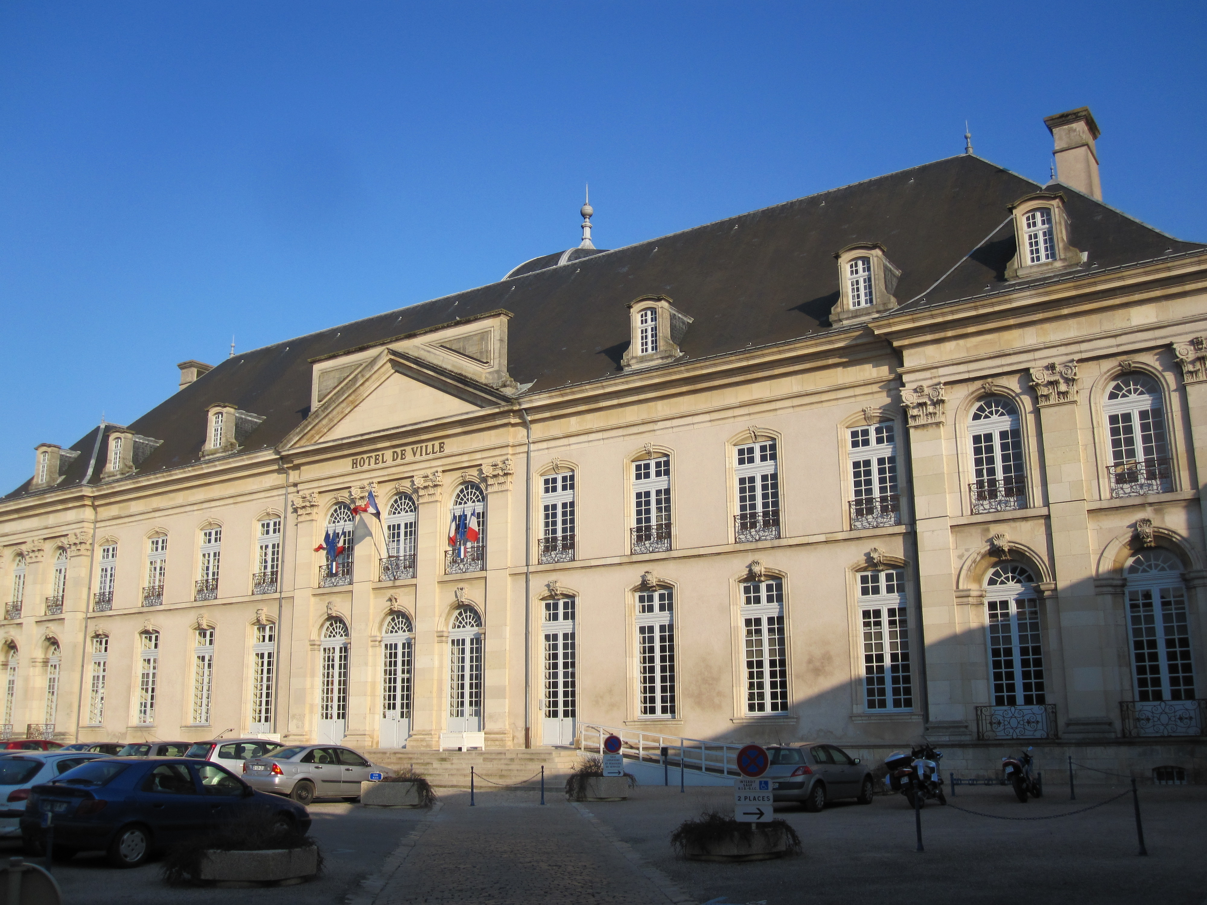 Façade côté cour du palais épiscopal de Toul, actuel hôtel de ville